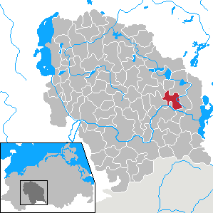 Gallin-Kuppentin in Mecklenburg-Vorpommern - District Parchim